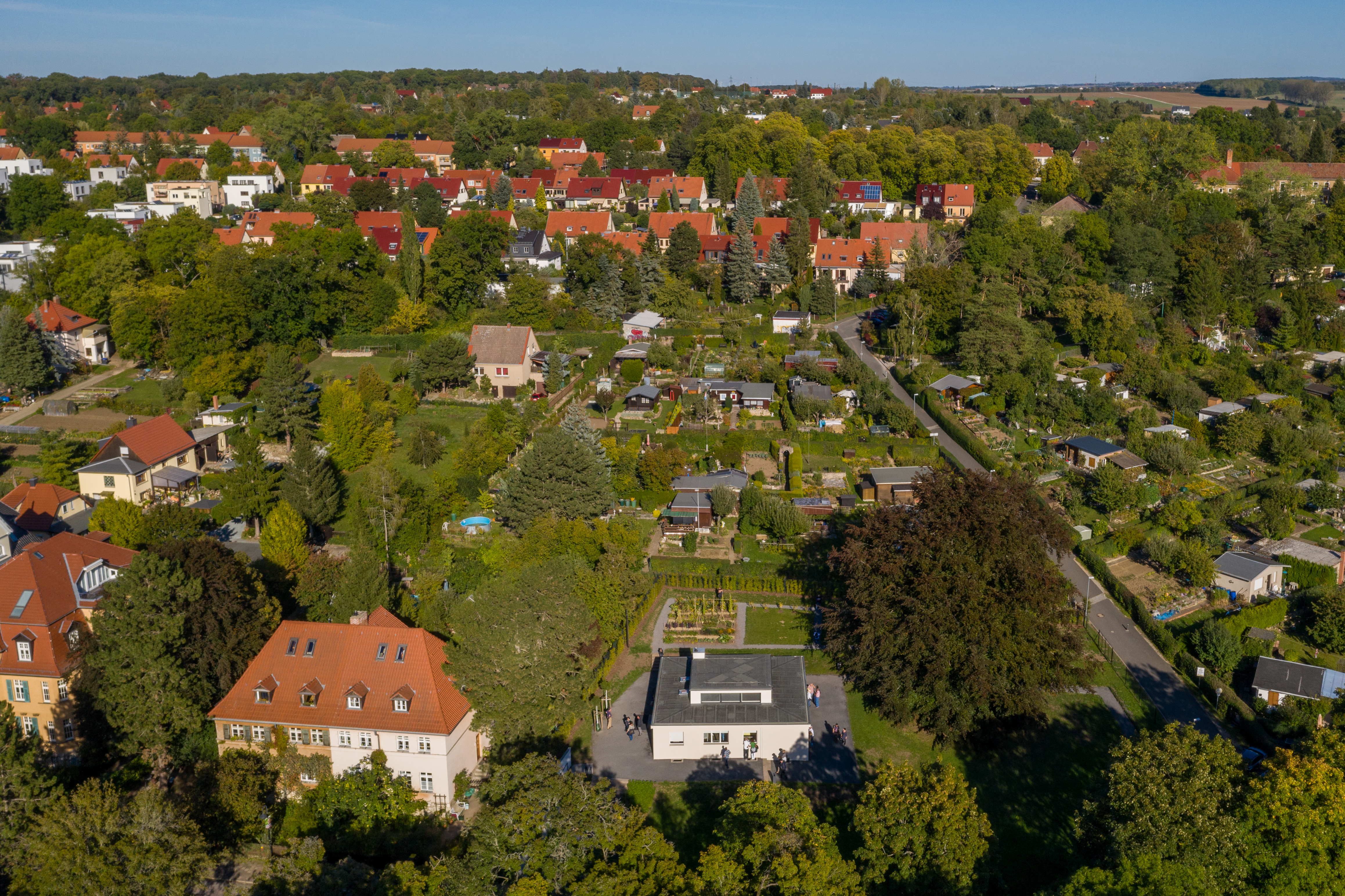 Haus am Horn, Weimar. Luftaufnahme